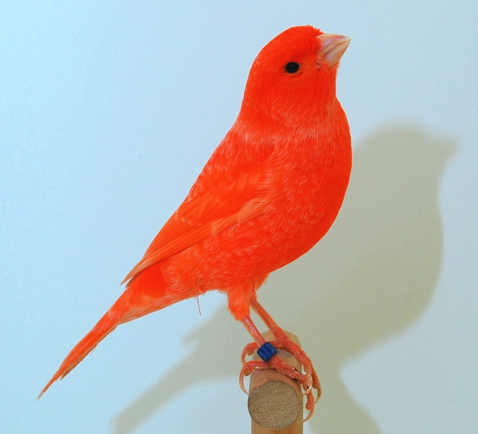 Farbenkanarie aufgehellt rot schimmel